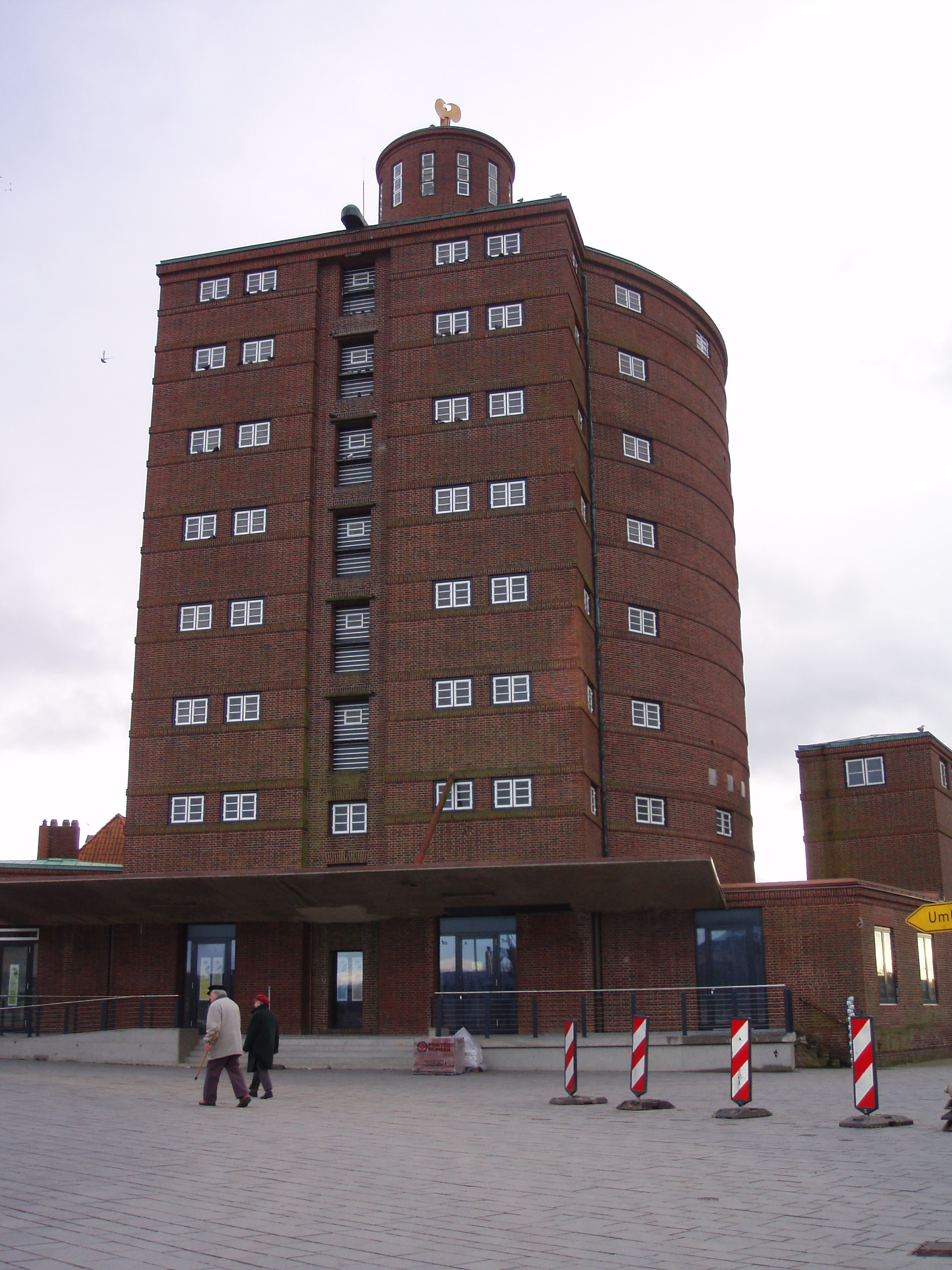 Eckernförde